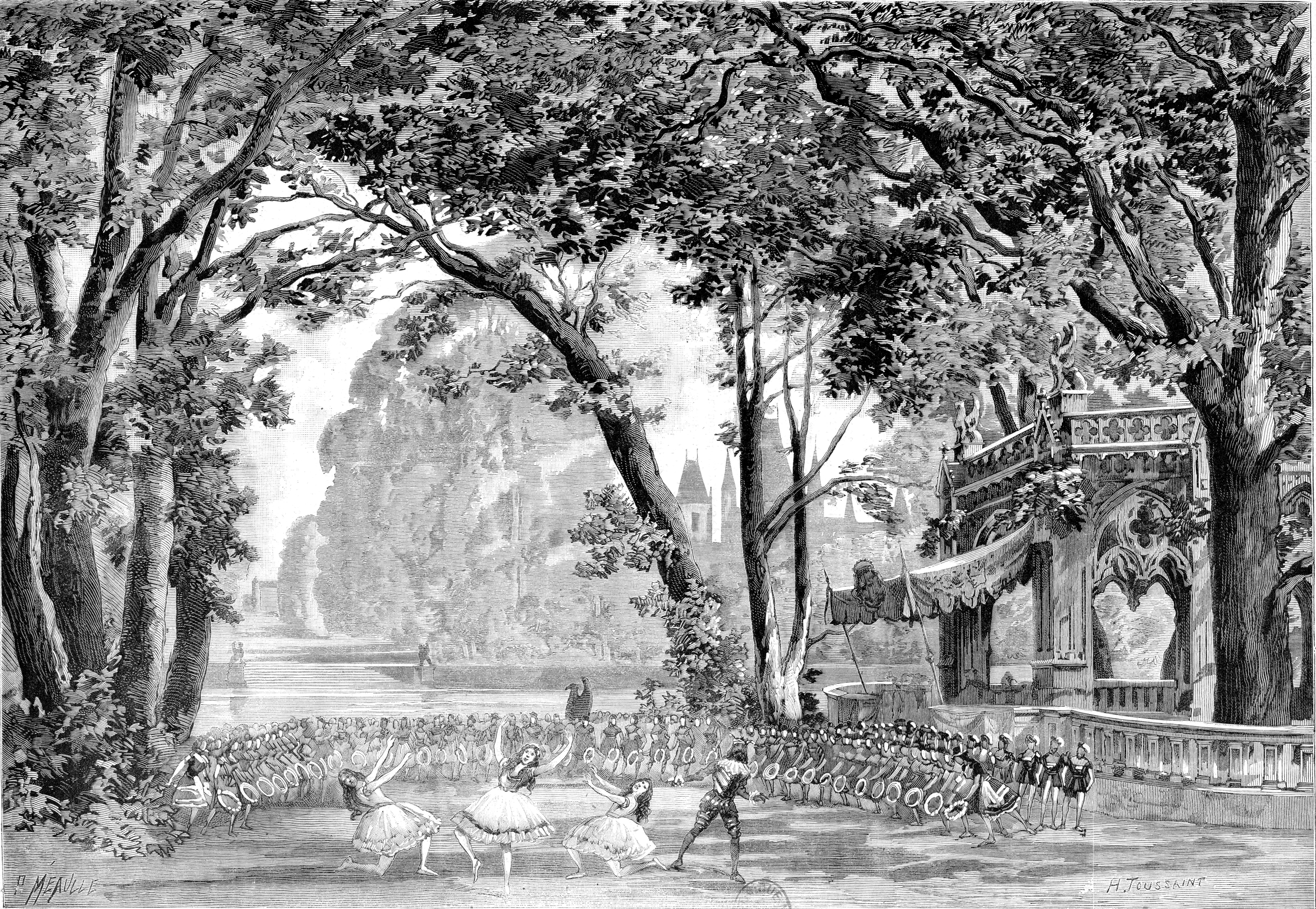 Saint-Saëns - Henry VIII - Le Ballet - Méaulle, Toussaint 1883